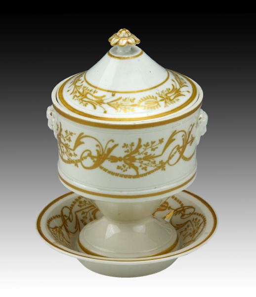 Colección de porcelanas de la Real Fábrica del Museo de Cerámica de l'Alcora. Azucarero s. XVIII-XIX